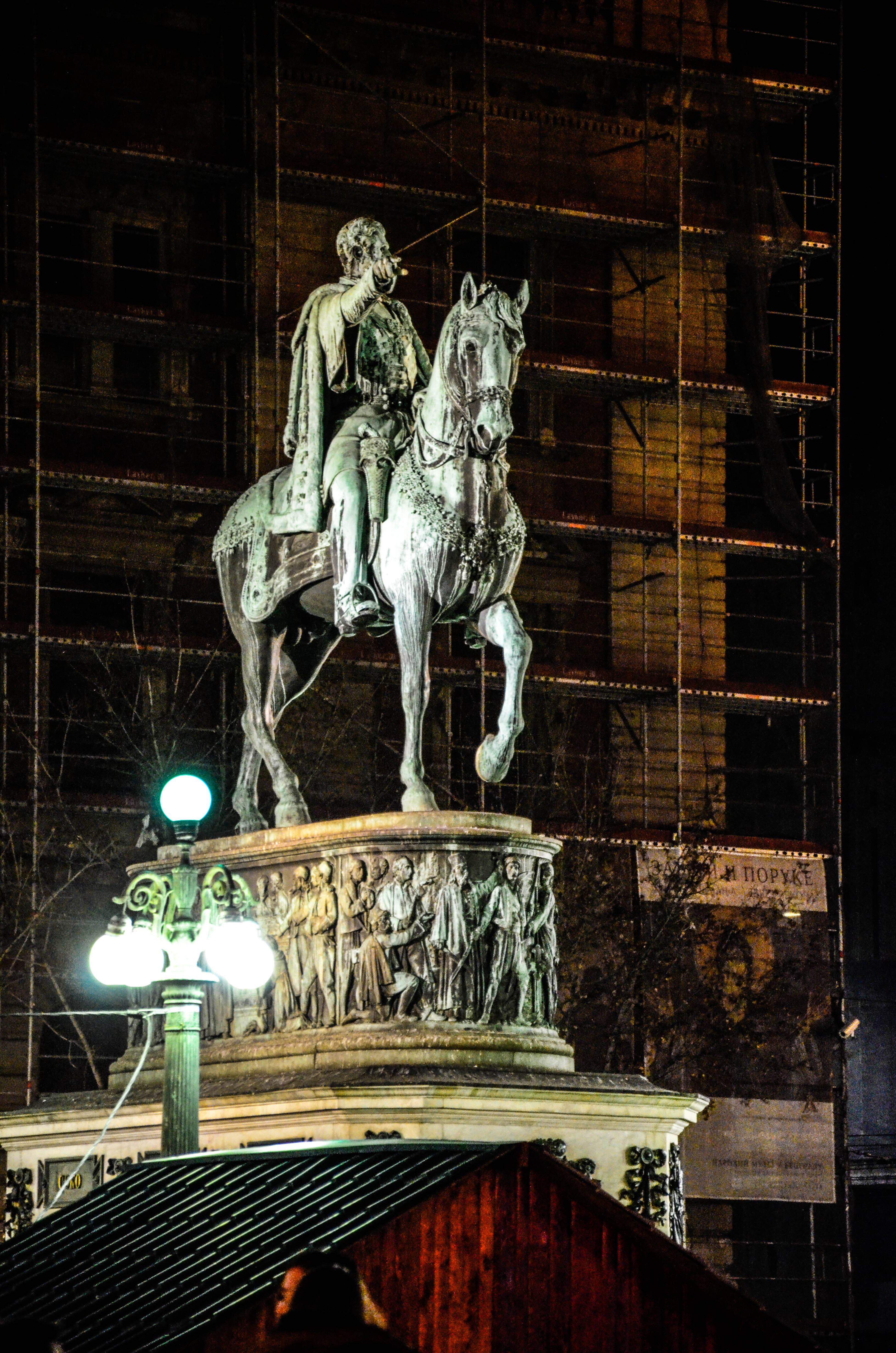 Konjanik koji se nalazi u centru Beograda